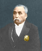 Xu Shichang.